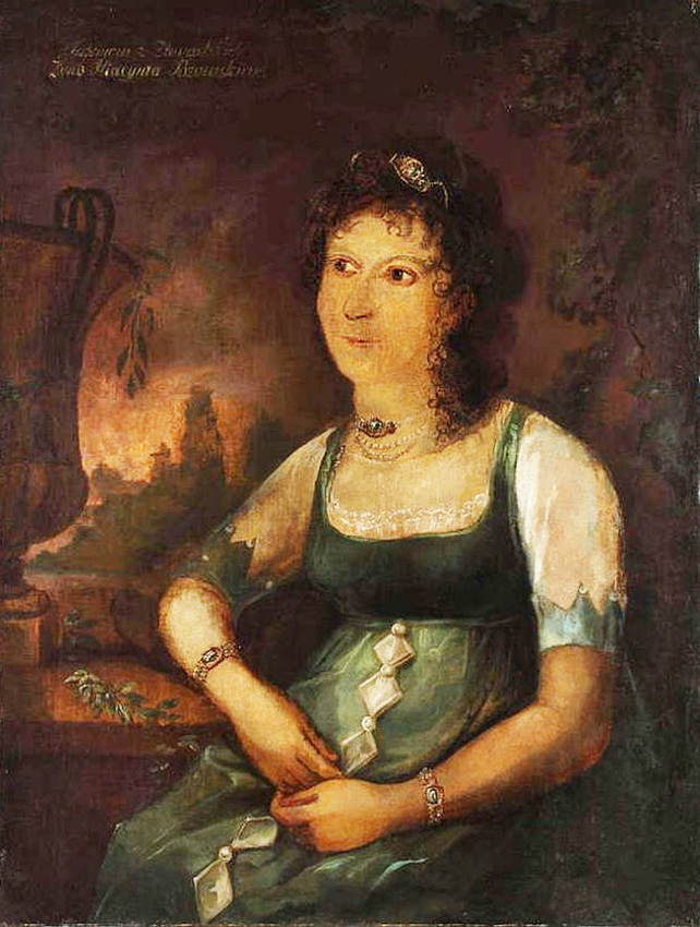 Zdjęcie portretu Salomei z Zawadzkich Bzowskiej, eksponowanego w Muzeum Krakowa